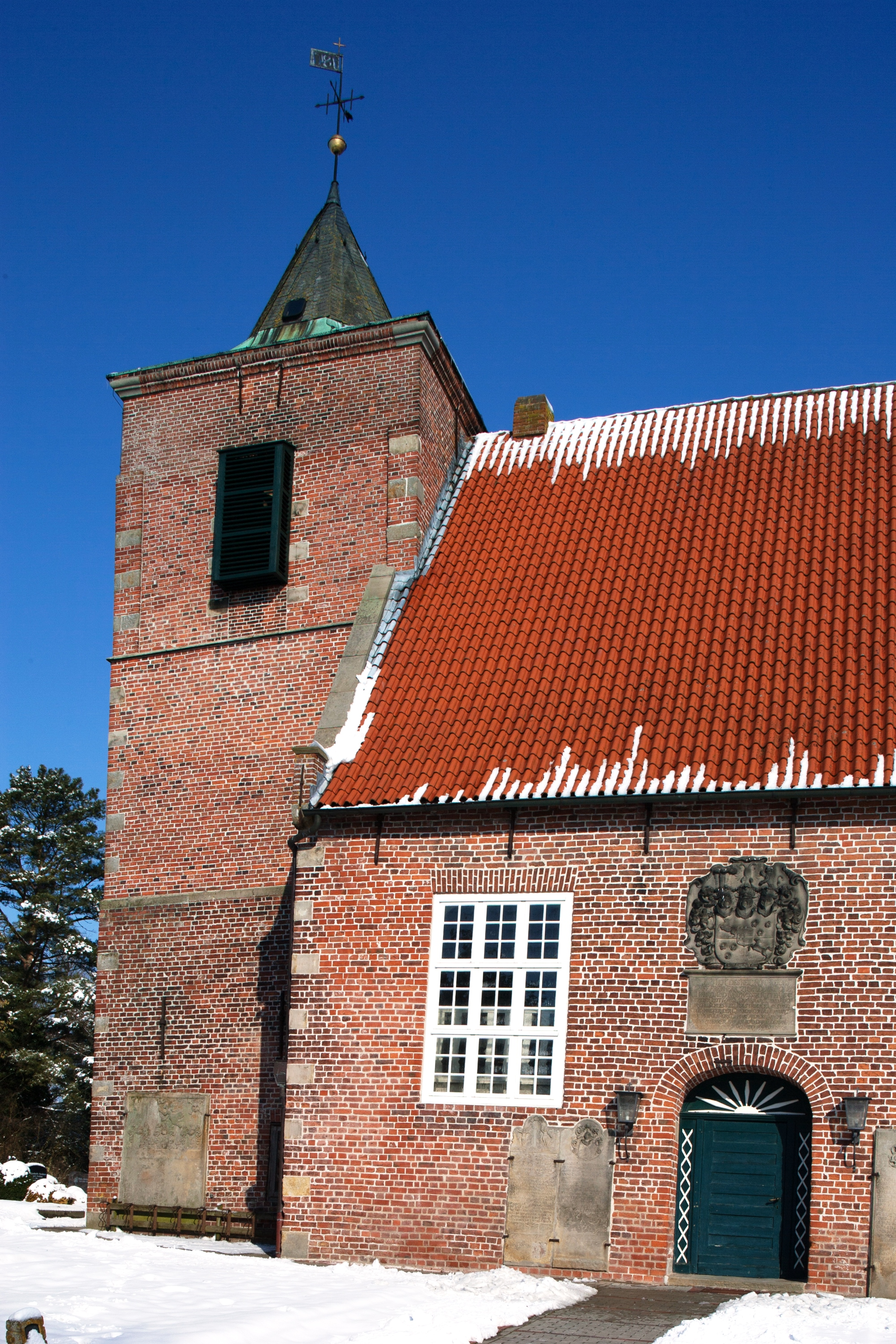 Kirche in Stadland-Seefeld